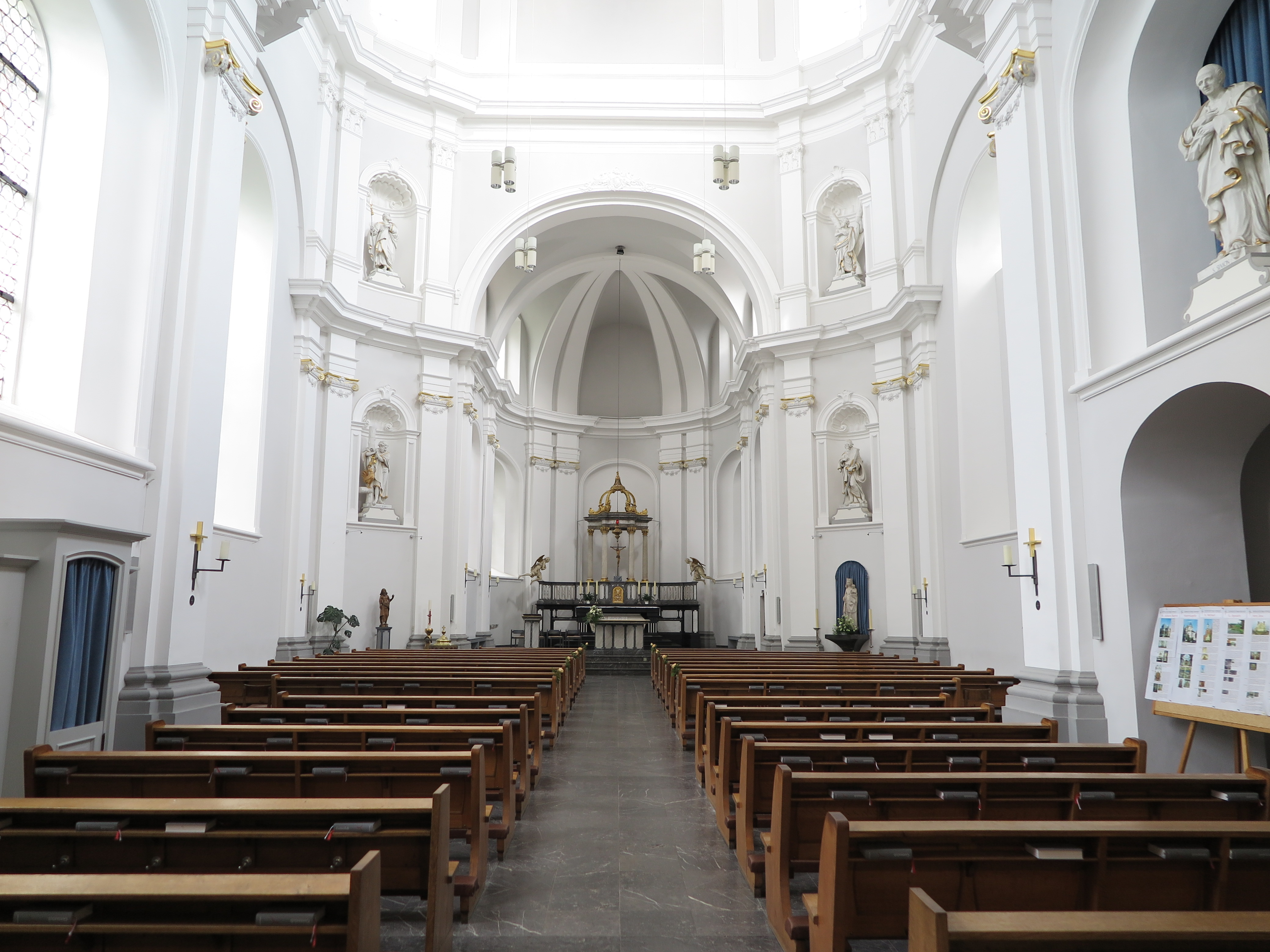 Blick zum Altar in St. Johann Baptist in Aachen-Burtscheid.